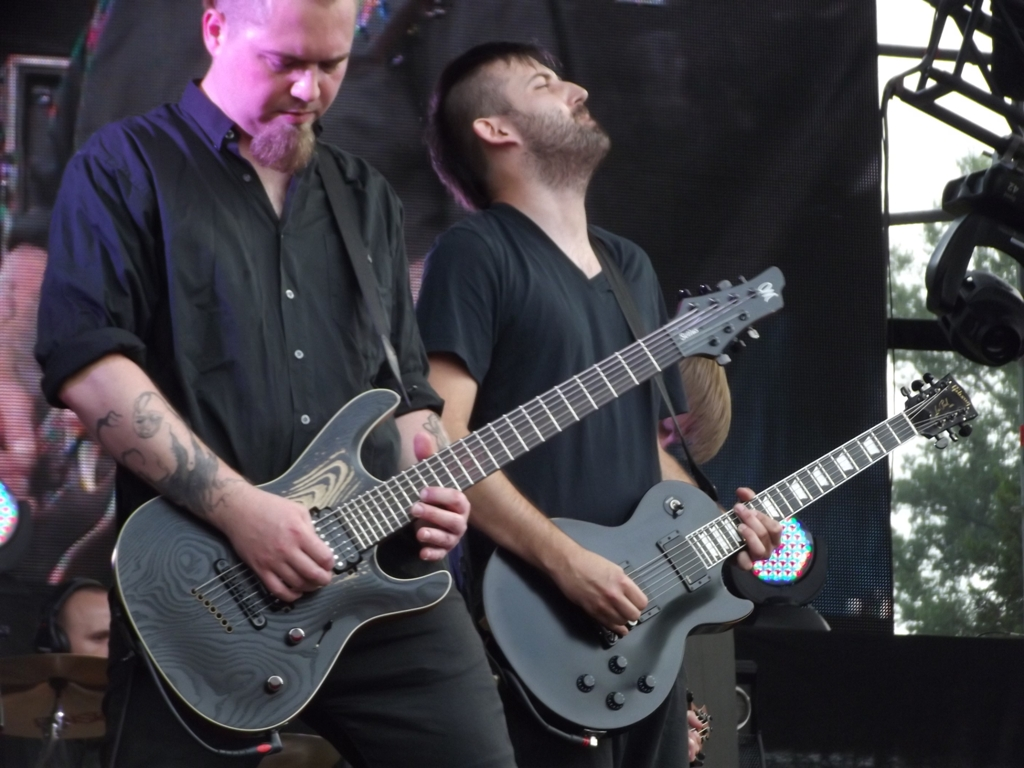 Zdjęcie zrobione podczas OFF Festival 2012 w Katowicach.